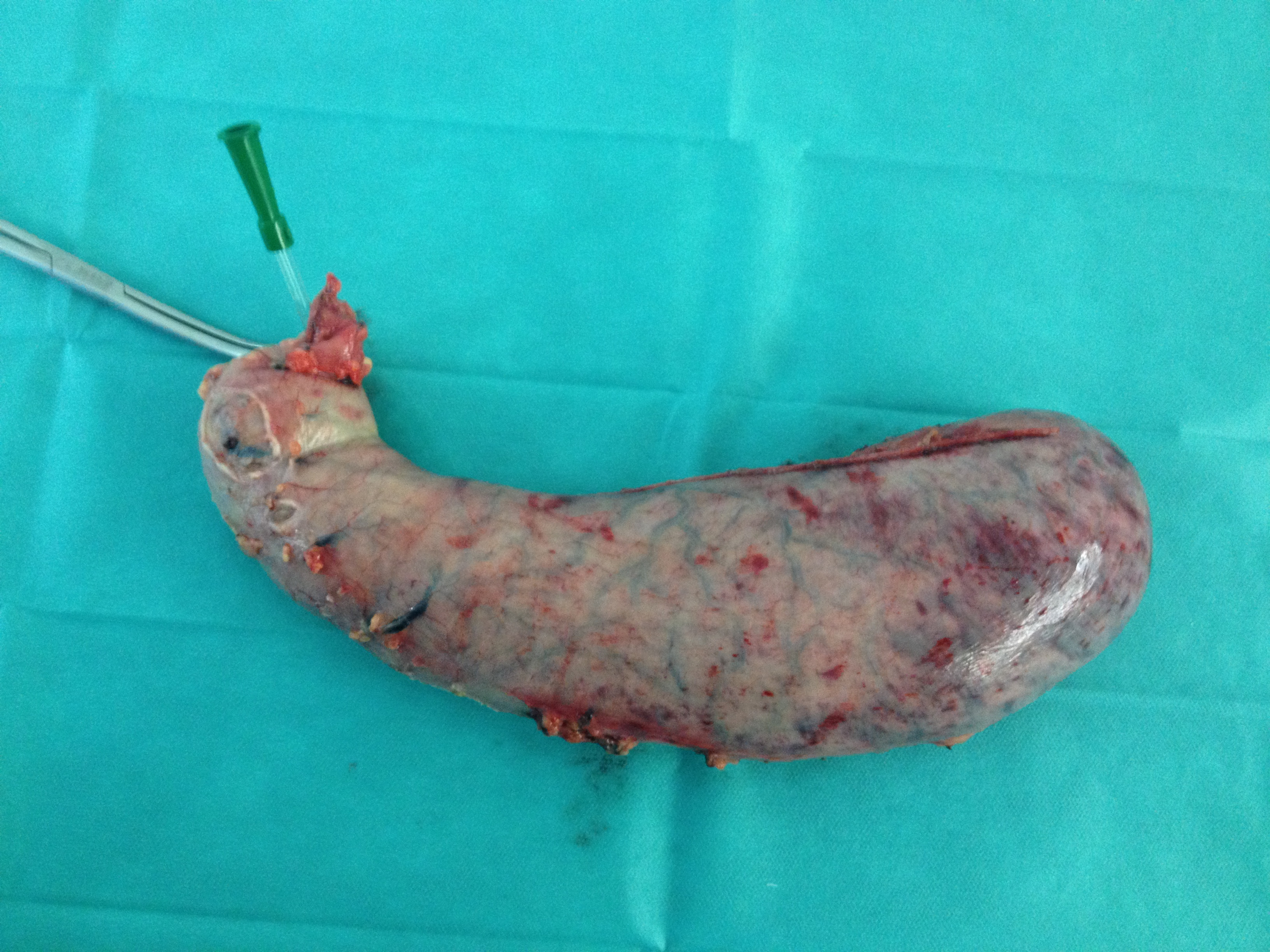 Schlauchmagen-OP ex situ-Volumetrie